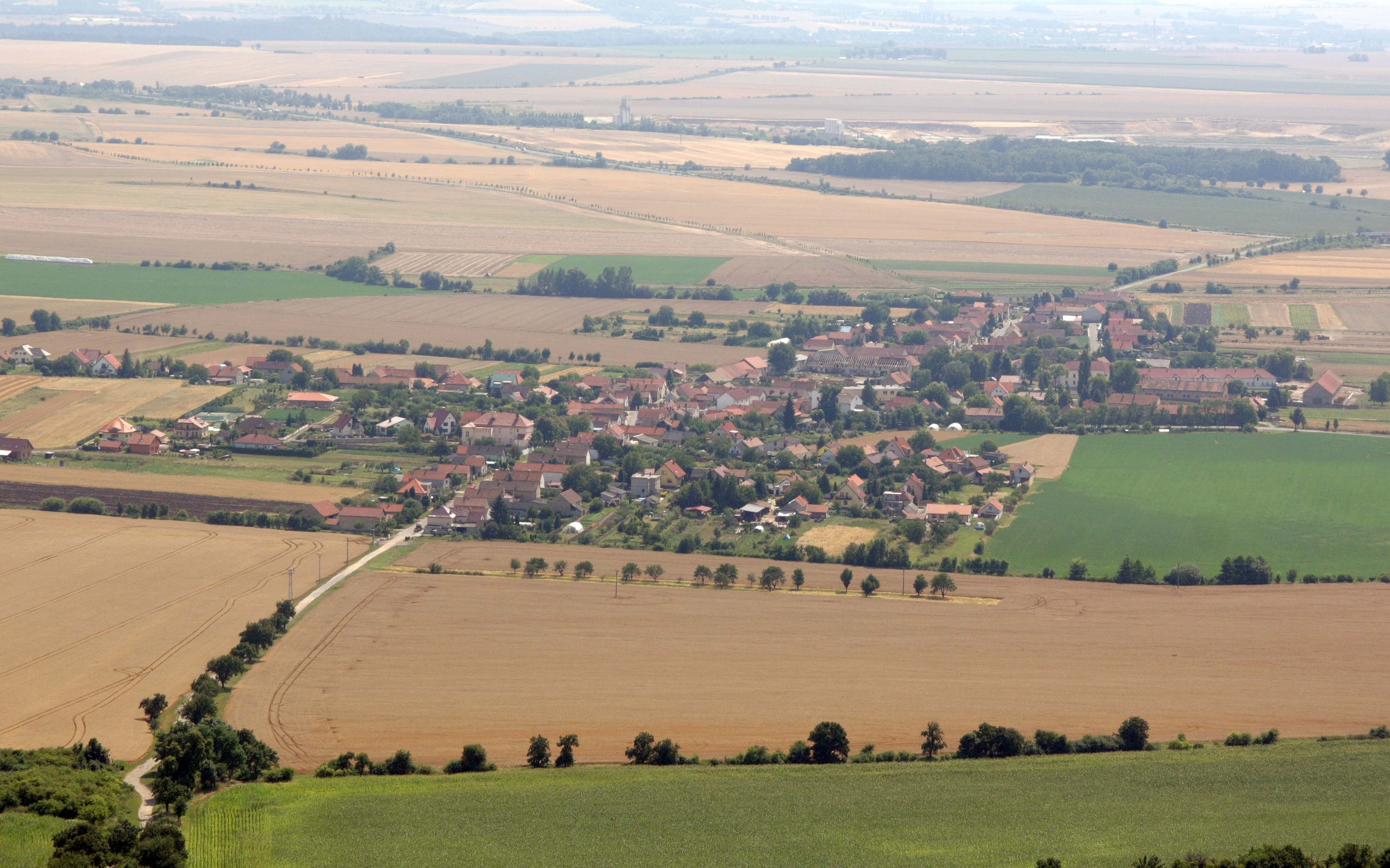 Mnetěš - pohled z Pražské vyhlídky na Řípu.